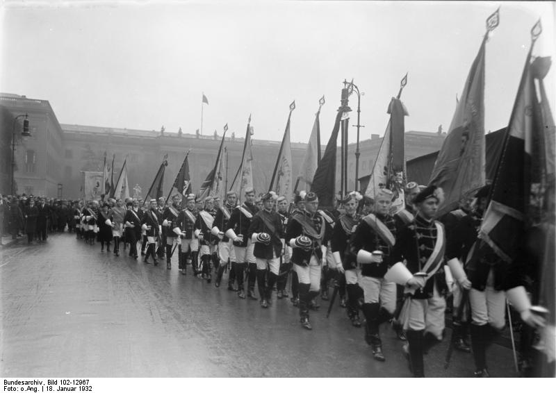 Reichsgründungsfeier der Studentenschaft am 18. Januar in der Universität zu Berlin ! Die Chargierten in vollem Wichs begeben sich zur Reichsgründungsfeier in die Universitäts-Aula Unter den Linden in Berlin.